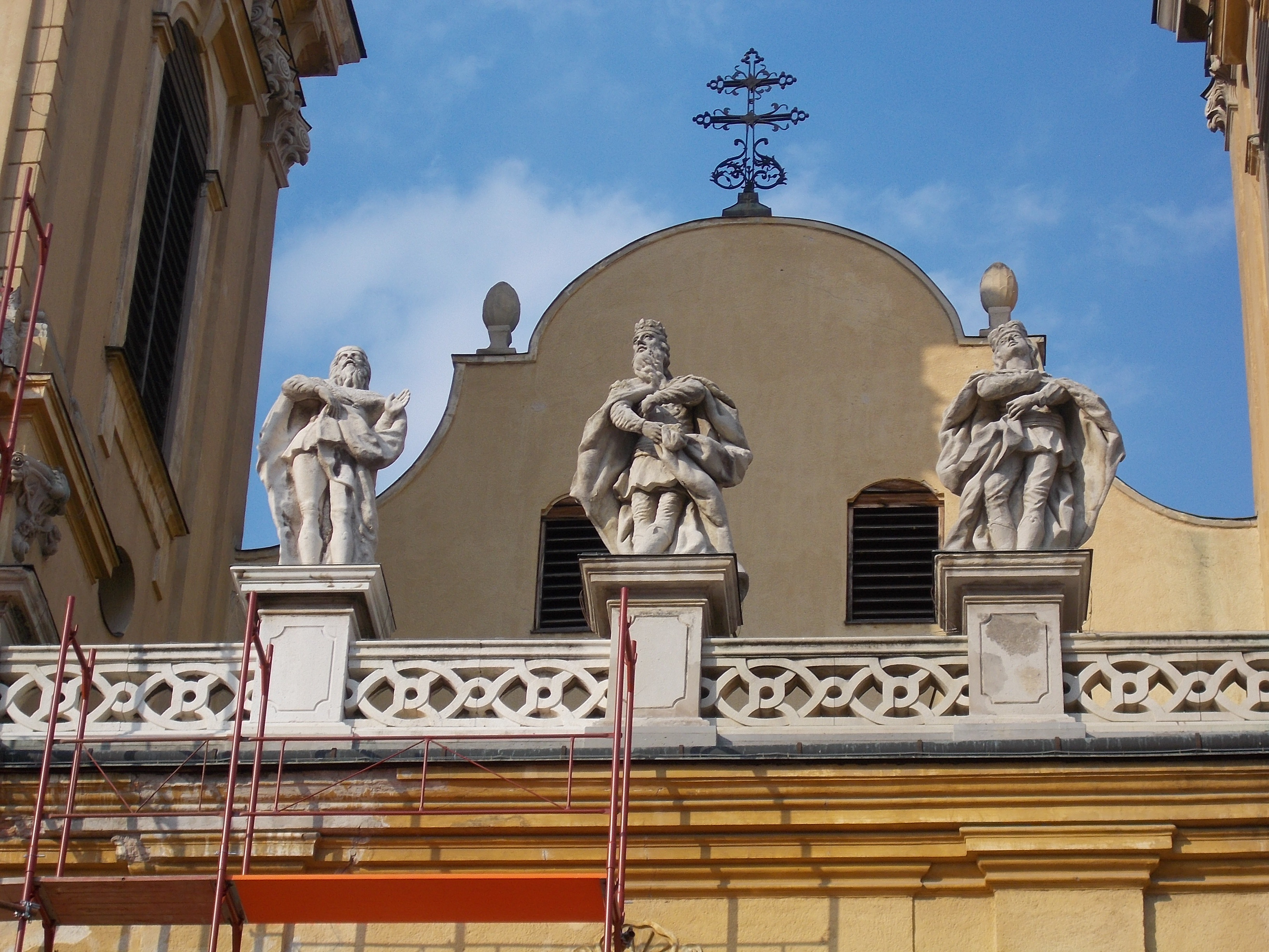 Szent István Székesegyház épületszobrai, Szent István (balra ) ( Antal Károly, 1967. Eredetileg: 1778). Szent László (középen) Huber János Pál műve, 1778 és Szent Imre (jobbra ). (Huber János Pál, 1778) gótikus, mészkő. A Székesegyház két tornya között található. ID 3806. Homokkő. - Magyarország, Fejér megye, Székesfehérvár, Belváros, Arany János utca This is a photo of a monument in Hungary, Identifier: 3806